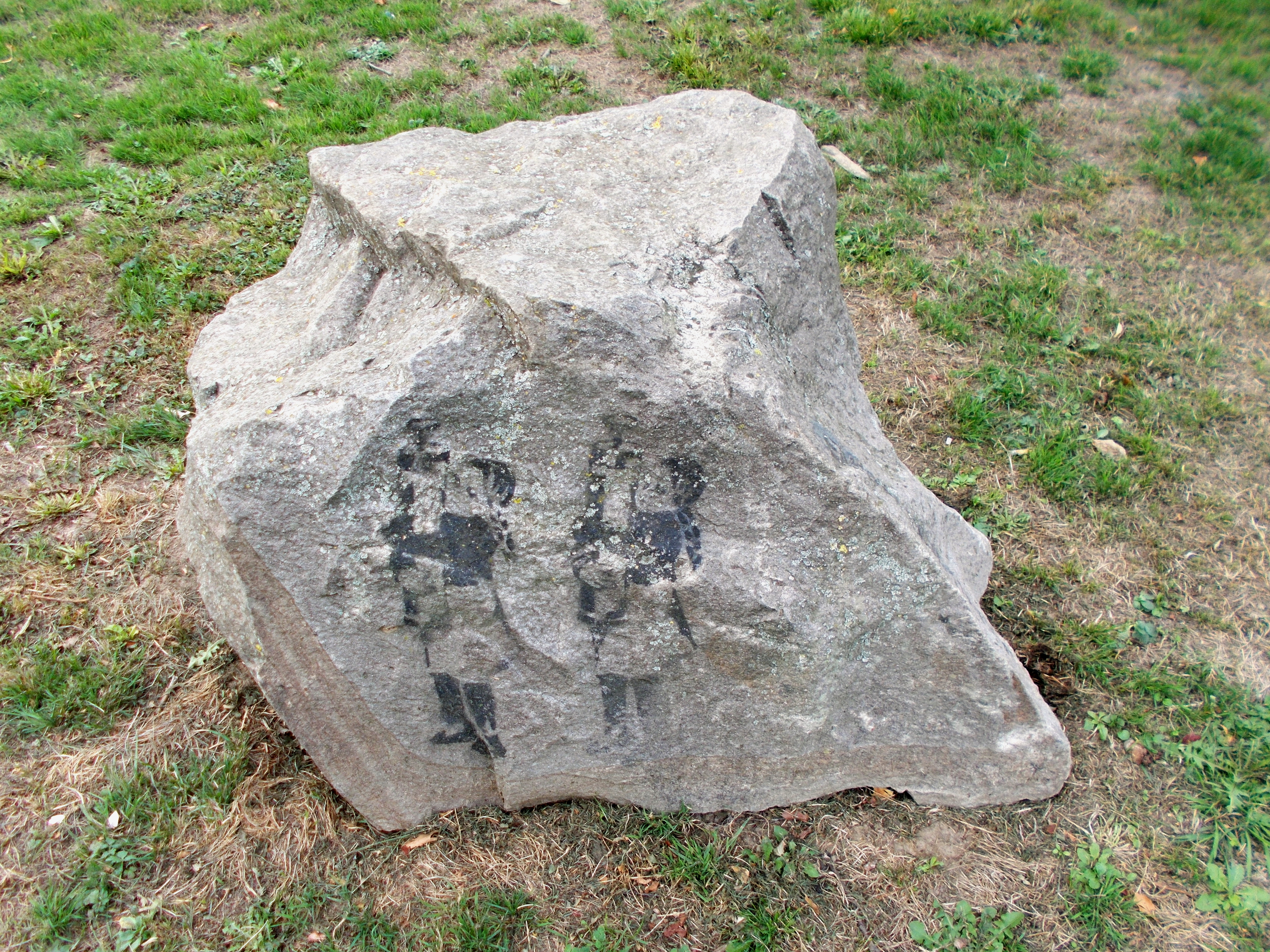 Zu Ehren Emil von Behring gestaltete 2013 die Mülheimer Künstlergruppe "AnDer" e. V. den Von-Behring-Platz. Skulptur "Retter der Kinder" von Ursula Vehar.